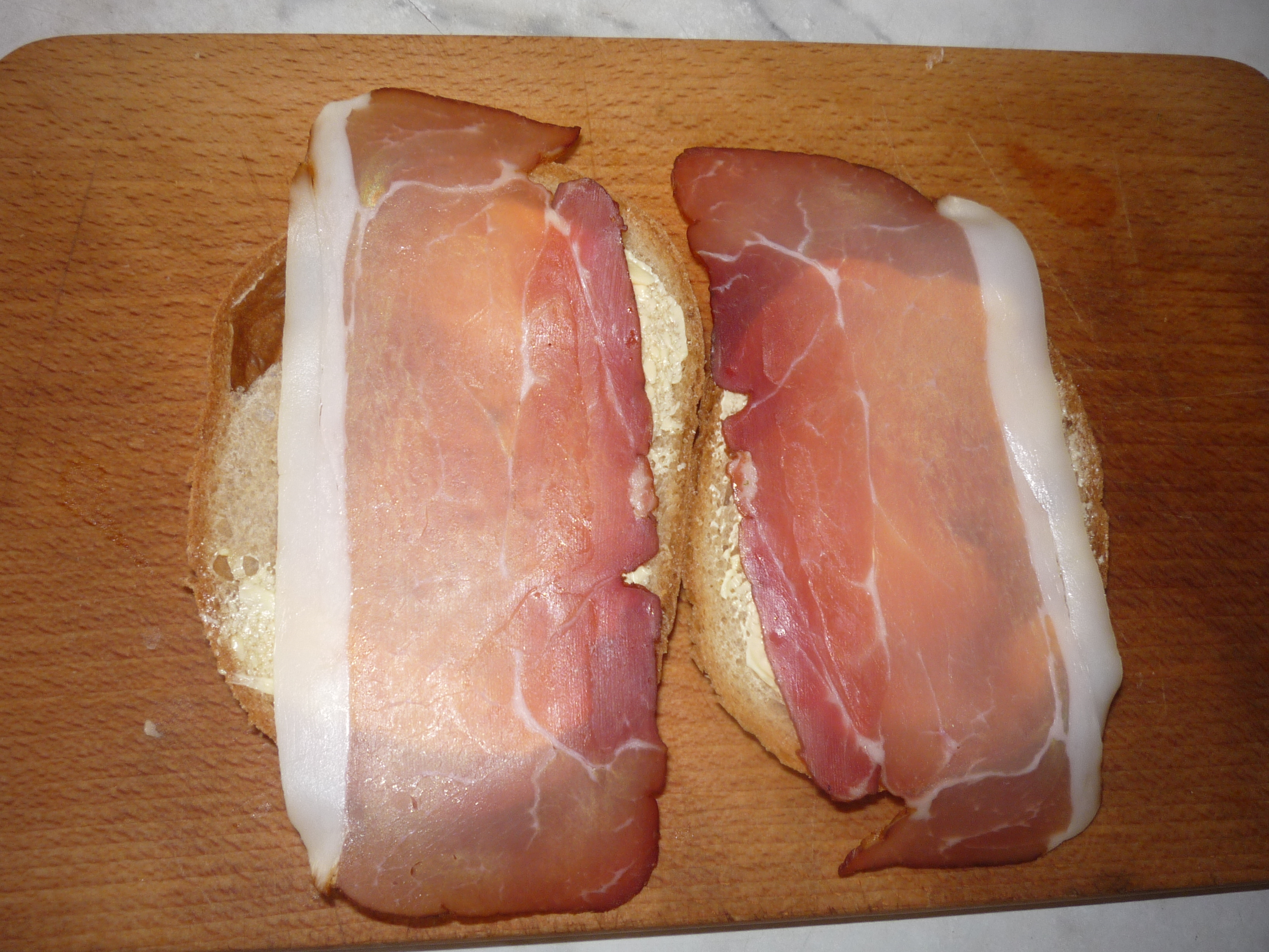 Autor fotografie Jiří Zelenka. Schwarzwälder Schinken. Nová oblíbená specialita v České republice. Vhodná na snídani a večeři ale i při přípravě pokrmů. Czech Republic.